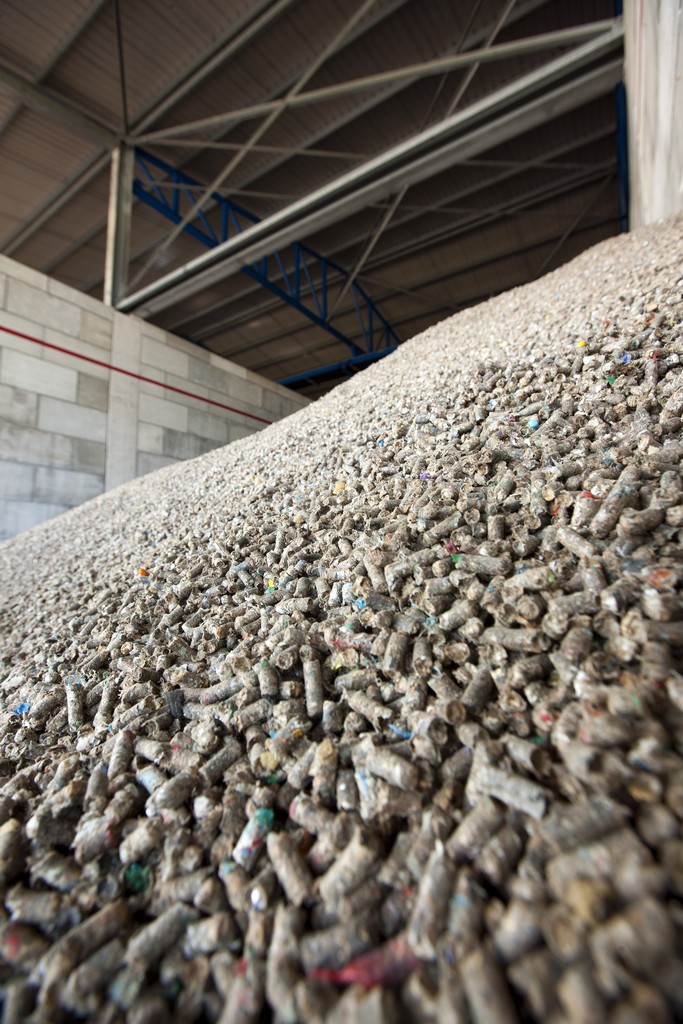 Voorbeeld van subcoal